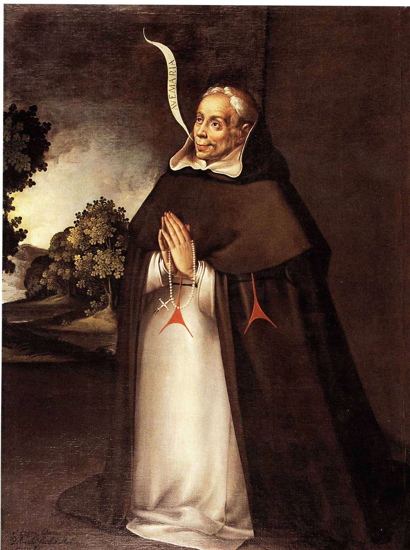 Simón de Rojas, cuadro de Pedro el Mudo (Fundación Montesdeoca García-Sáenz, Las Palmas de Gran Canaria)